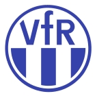 Ehemaliges Vereinswappen des VfR Schwenningen